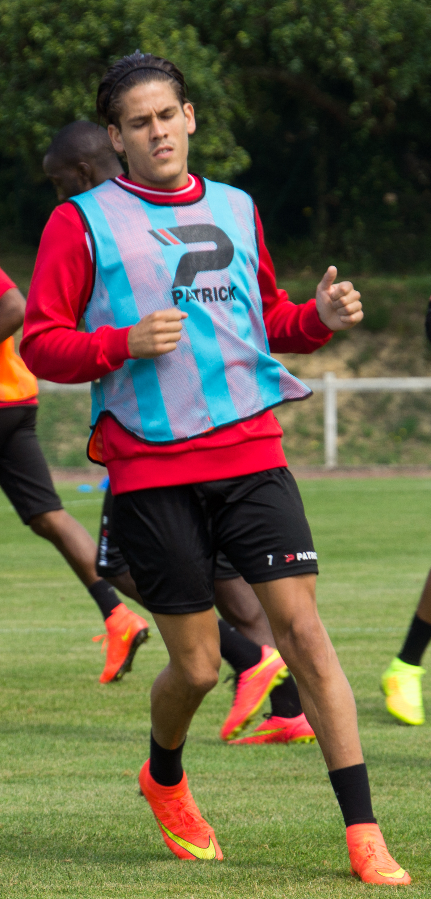 Dorian Leveque à l'entrainement le 11 juillet 2014